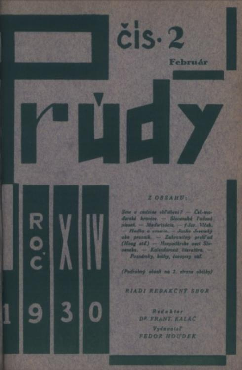 Titulný list časopisu Prúdy.